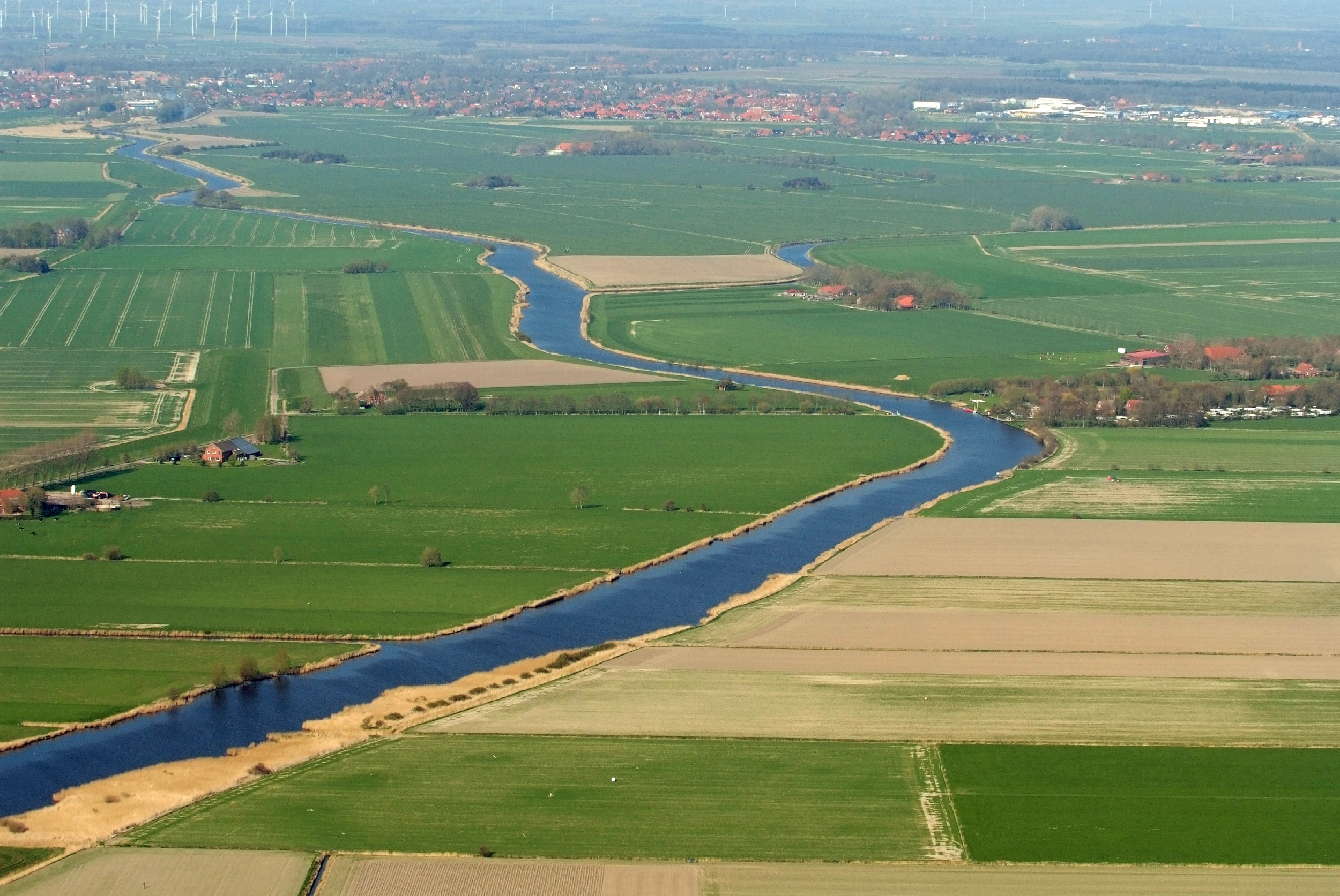 Norder Tief / Fotoflug von Nordholz-Spieka nach Oldenburg und Papenburg